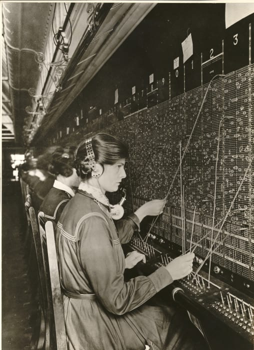 Manuel betjening på telefoncentral